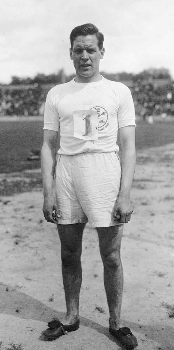 Stade Pershing : match athlétisme France-Angleterre : Nichol, gagnant du 100 mètres : [photographie de presse] / Agence Meurisse